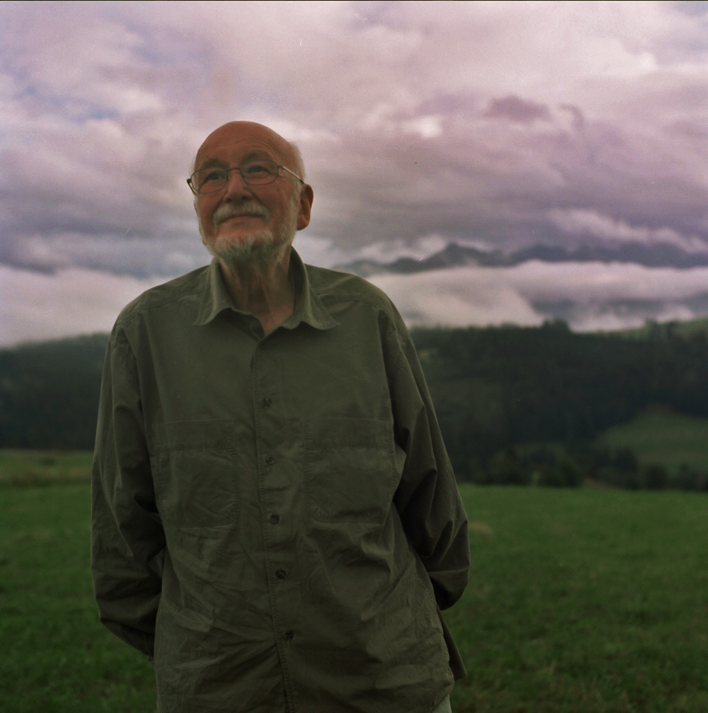 fot. Helena Skąpska